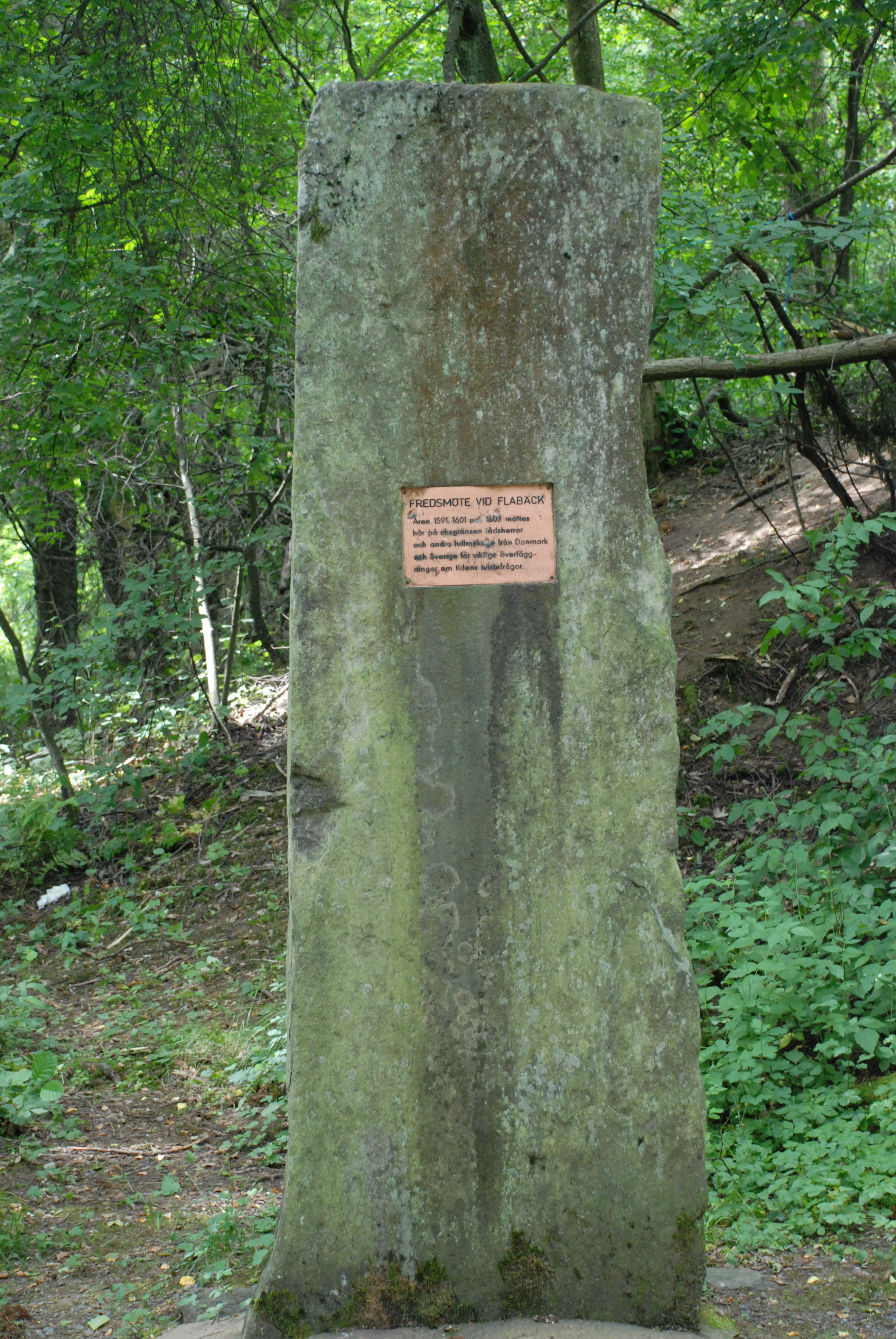 Minnesstenen över gränsmötena vid Flabäck 1591, 1601 och 1603 restes på platsen 1979 av Kållereds Hembygdsgille och Mölndals kommun.